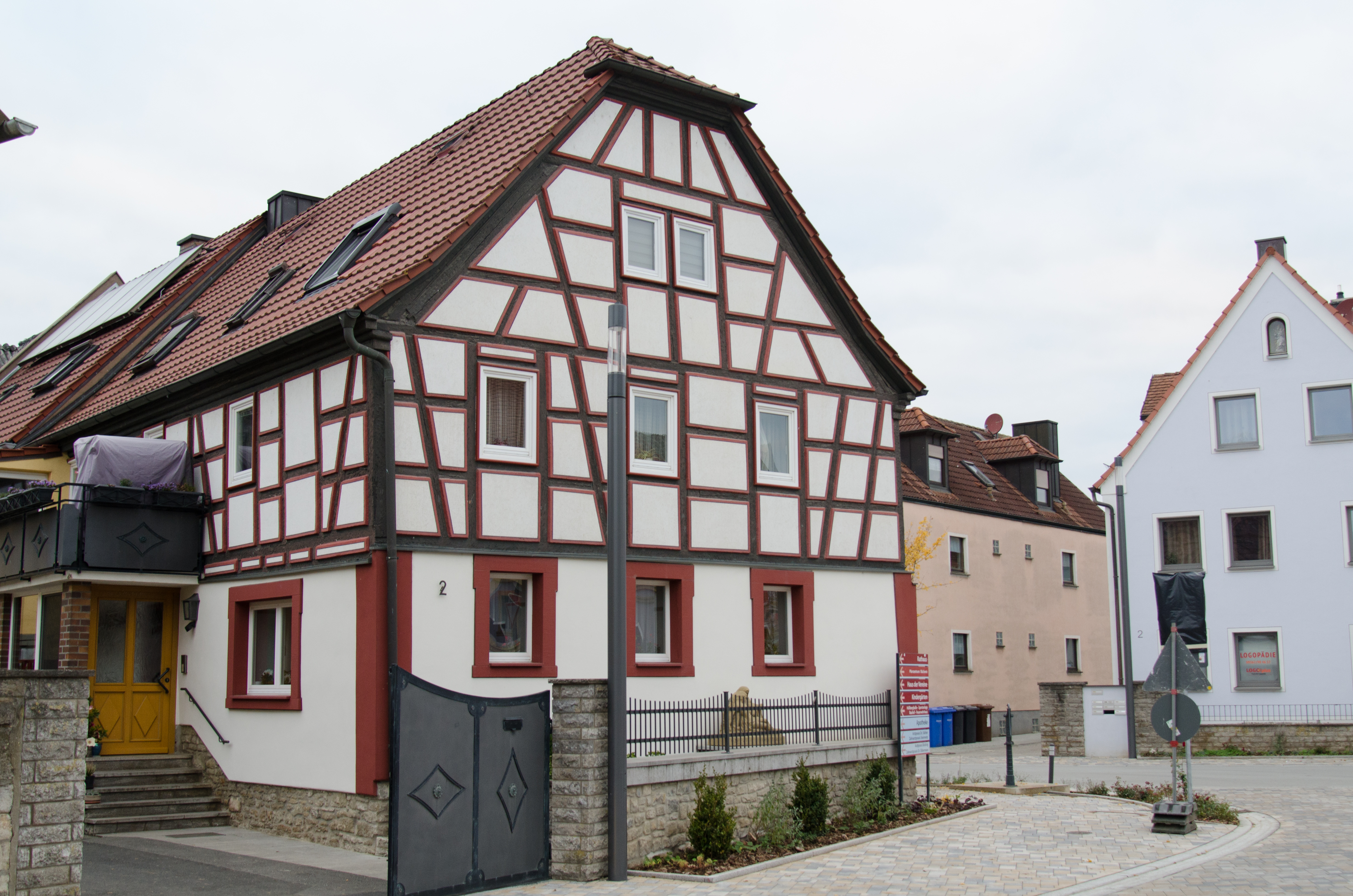 Kürnach, Hauptstraße 2